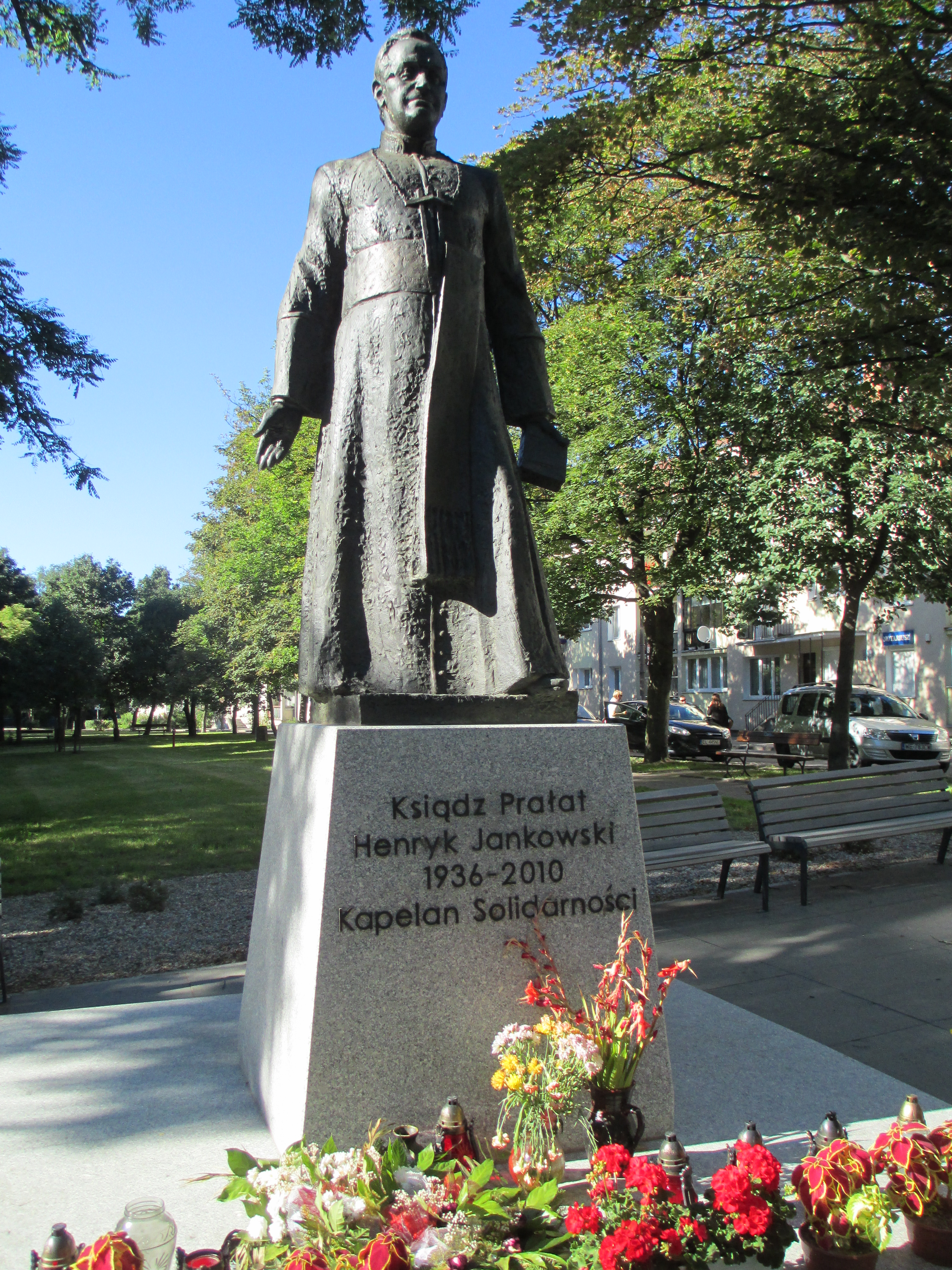 פסל של הכומר הנריק ינקובסקי בגדנסק